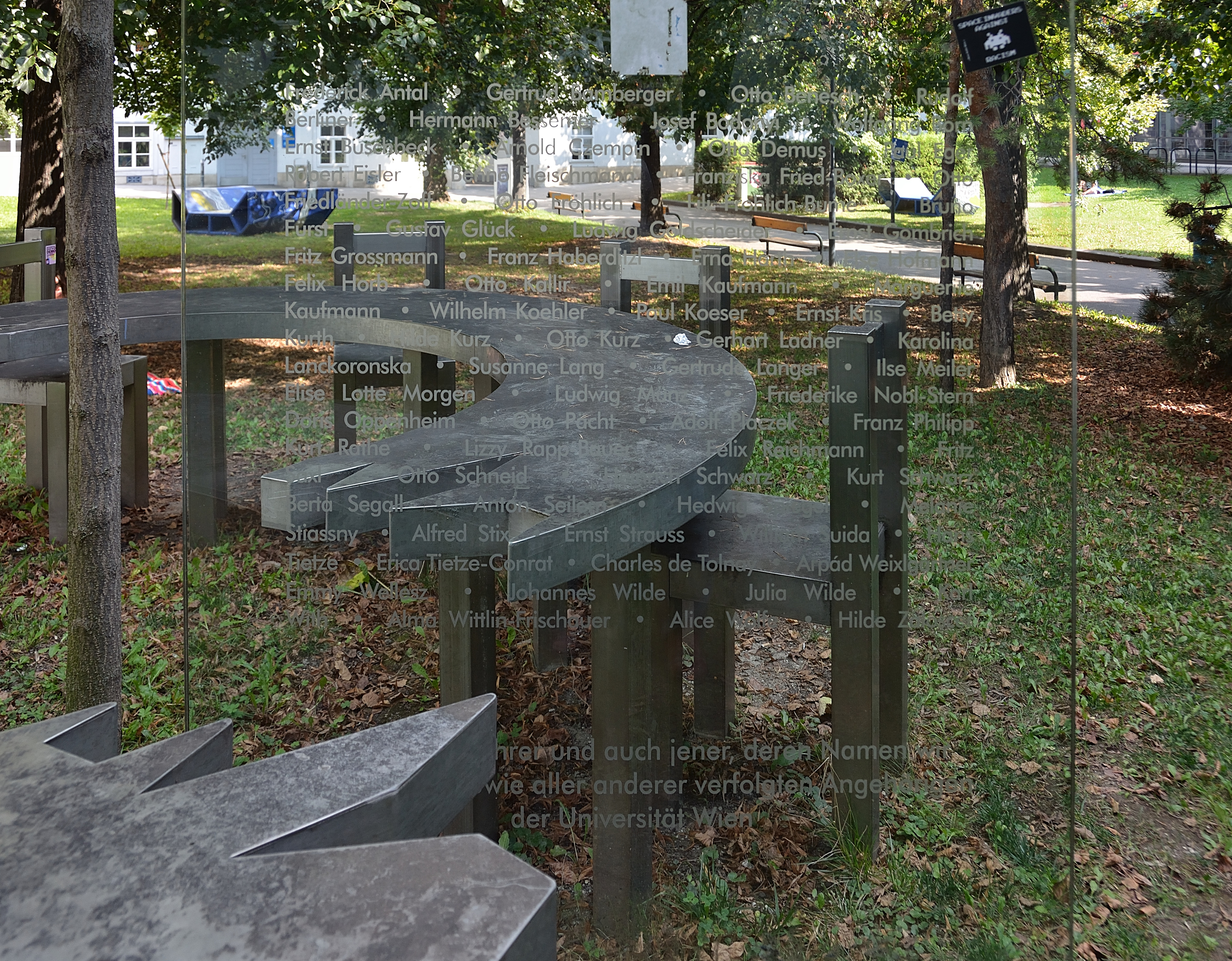 Denkmal für die ausgegrenzten, vertriebenen und ermordeten Absolventinnen und Absolventen des kunsthistorischen Instituts der Universität Wien, Campus (AAKH), Hof 9 vor dem Institut für Kunstgeschichte. Es wurde nach einem Entwurf von Hans Buchwald errichtet und im Oktober 2008 eingeweiht. [1]